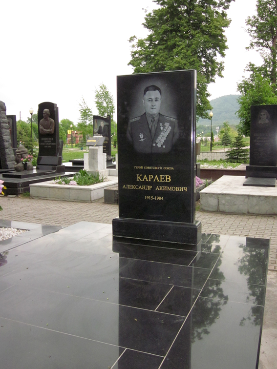 Надгробный памятник Герою Советского Союза Александру Акимовичу Караеву на Аллее Славы в Красногвардейском парке города Владикавказа.